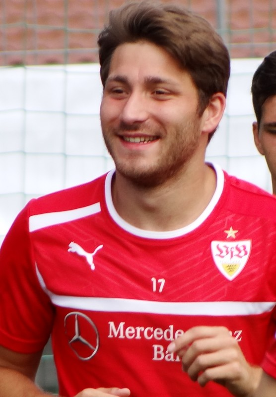 Tunay Torun beim VfB Training am 07.07.12. Aufgenommen von